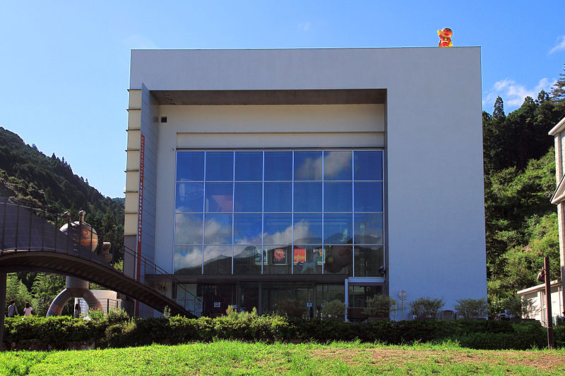 香美市立やなせたかし記念館 アンパンマンミュージアム（高知県香美市）